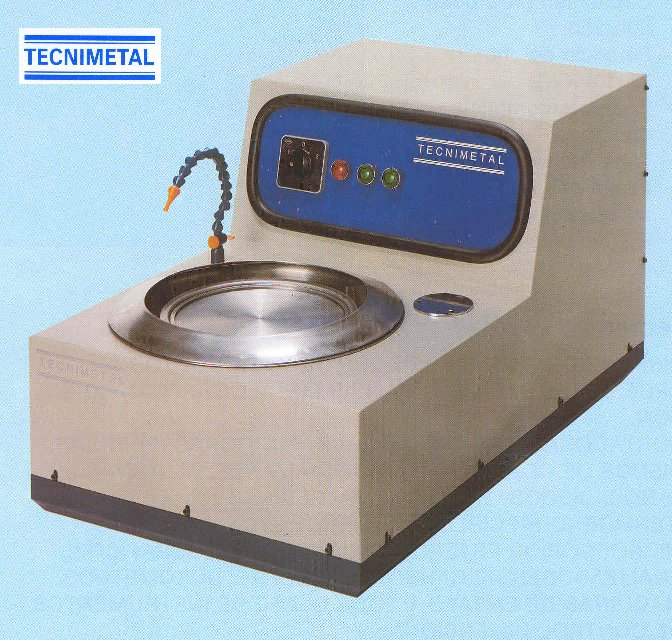 Pulidora metalográfica tecnimetal